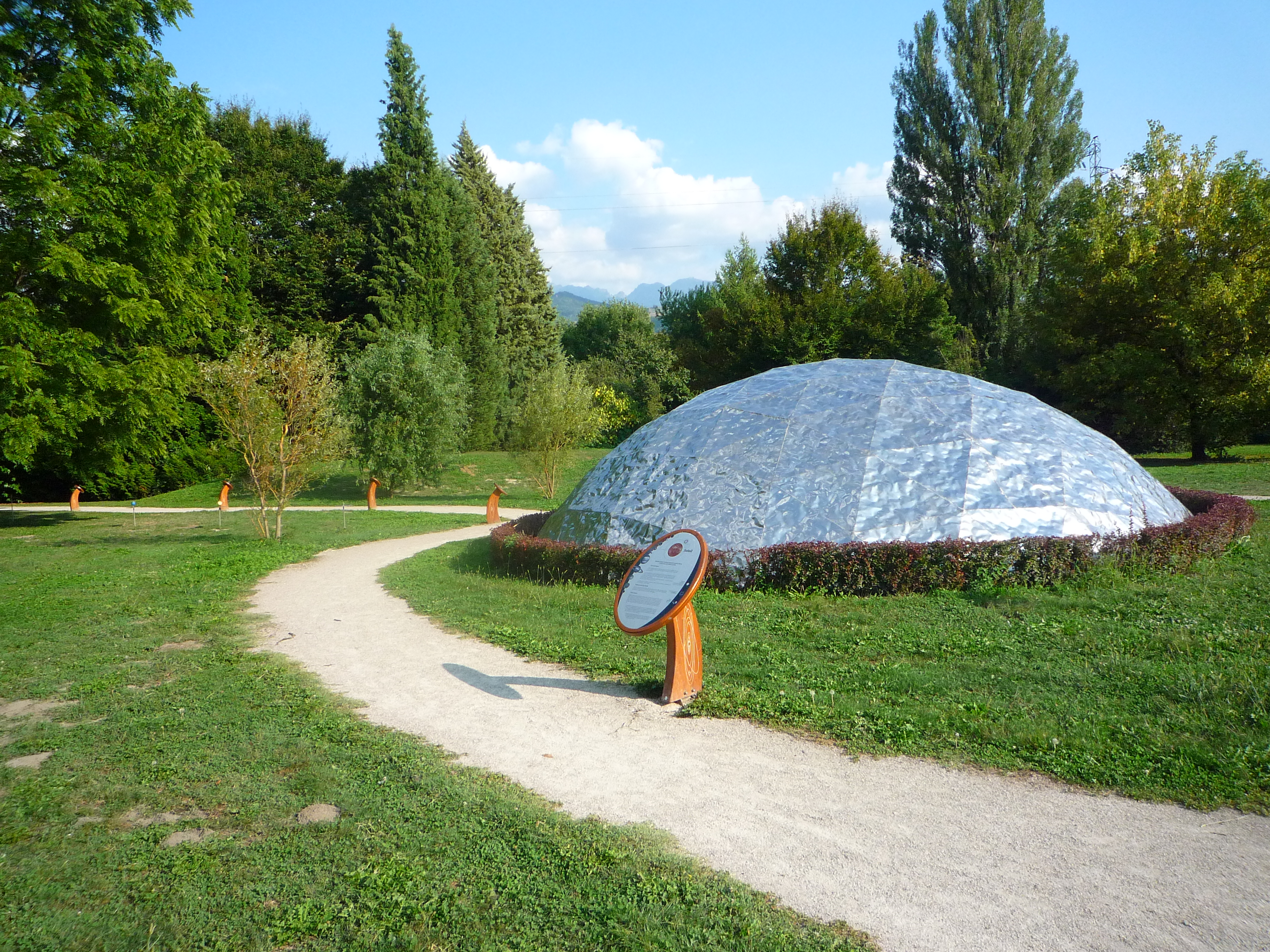 Sentier planétaire Manuel Forestini dans l'arboretum Robert Ruffier-Lanche à Saint-Martin-d'Hères.